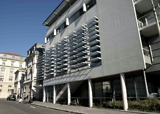 Bâtiment pédagogique de l'IEP de Lyon - Vue extérieure